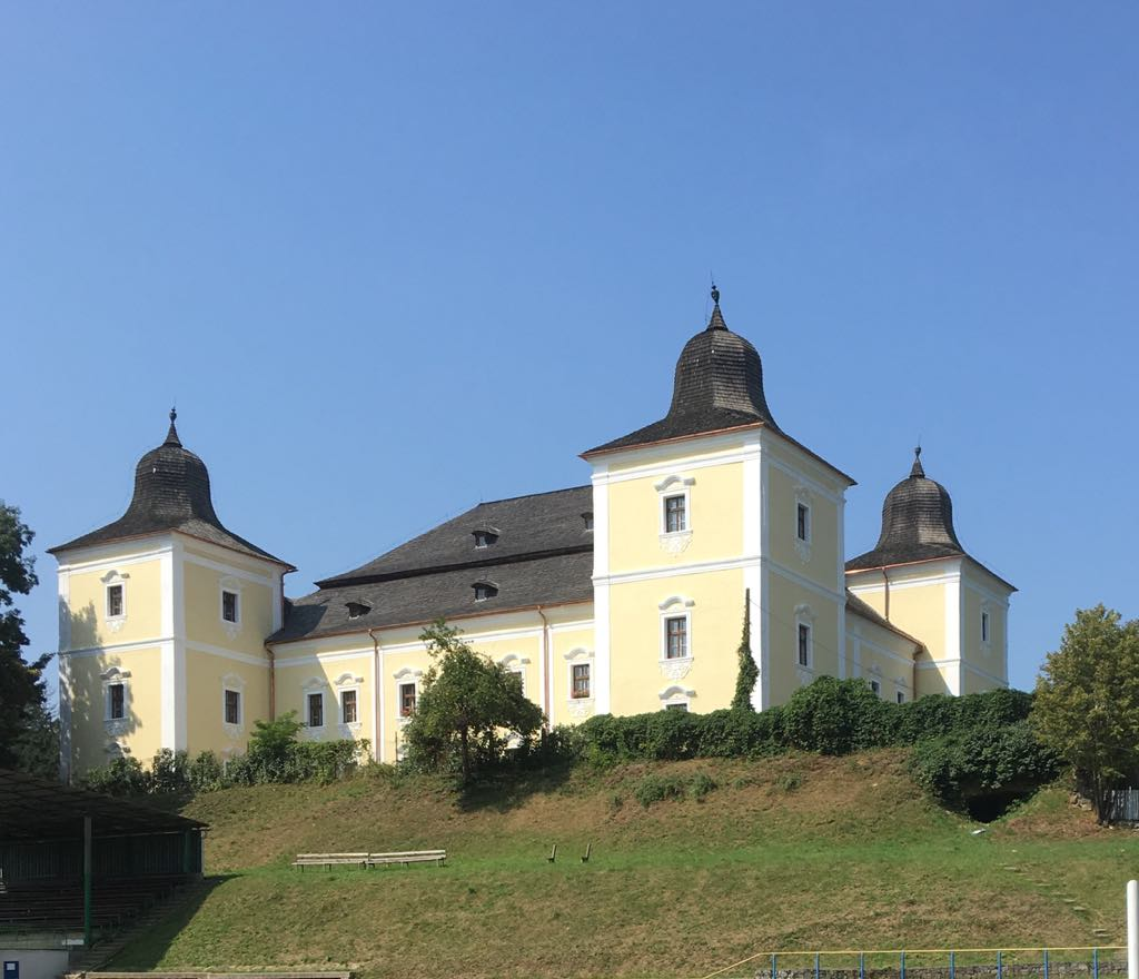 Veľký kaštieľ alebo Vlastivedné múzeum Hanušovce nad Topľou.